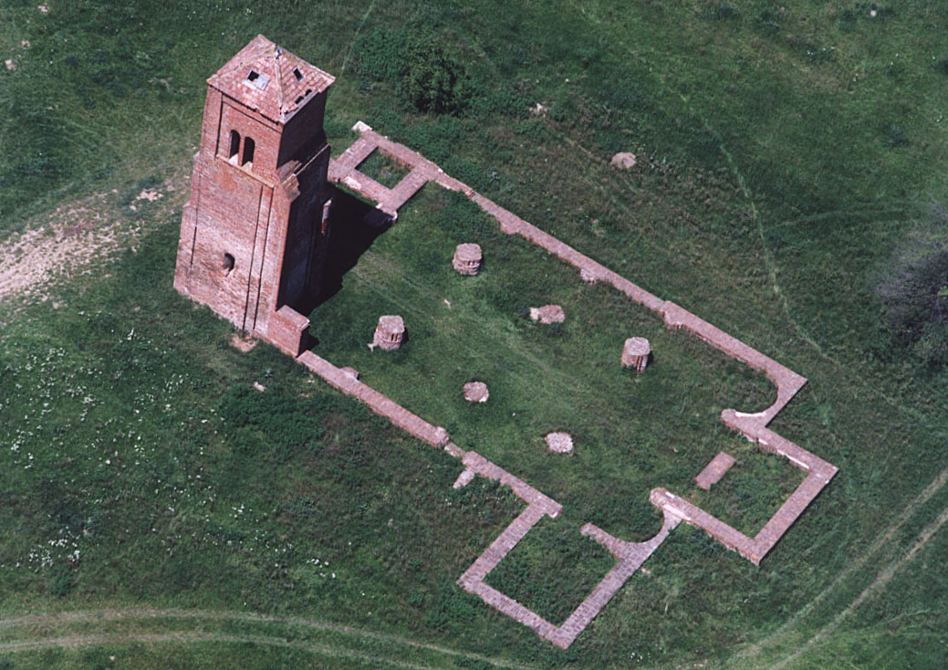 A herpályi Csonkatorony az egykori Herpály nevű település 12. században román stílusban épült monostorának maradványa, Hajdú-Bihar megye legrégebbi építménye, amely Berettyóújfalu határában látható.